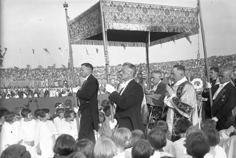 Der grosse märkische Katholikentag im Berliner Stadion! Der päpstliche Nuntius in Berlin, Monsignore Cesare Orsenigo, zelibrierte persönlich vor über 50tausend Menschen die heilige Messe. Der päpstliche Nuntius in Berlin, Monsignore Cesare Orsenigo im feierlichen Zuge unter dem Baldachin mit dem Allerheiligsten im Stadion in Berlin.